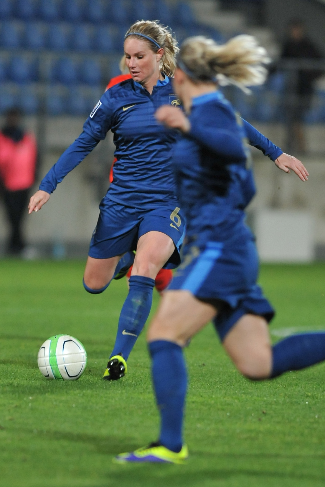 FIFA Women's World Cup 2015 Qualiying Round Österreich - Frankreich am 31. Oktober 2013 in Ritzing: Amandine Henry